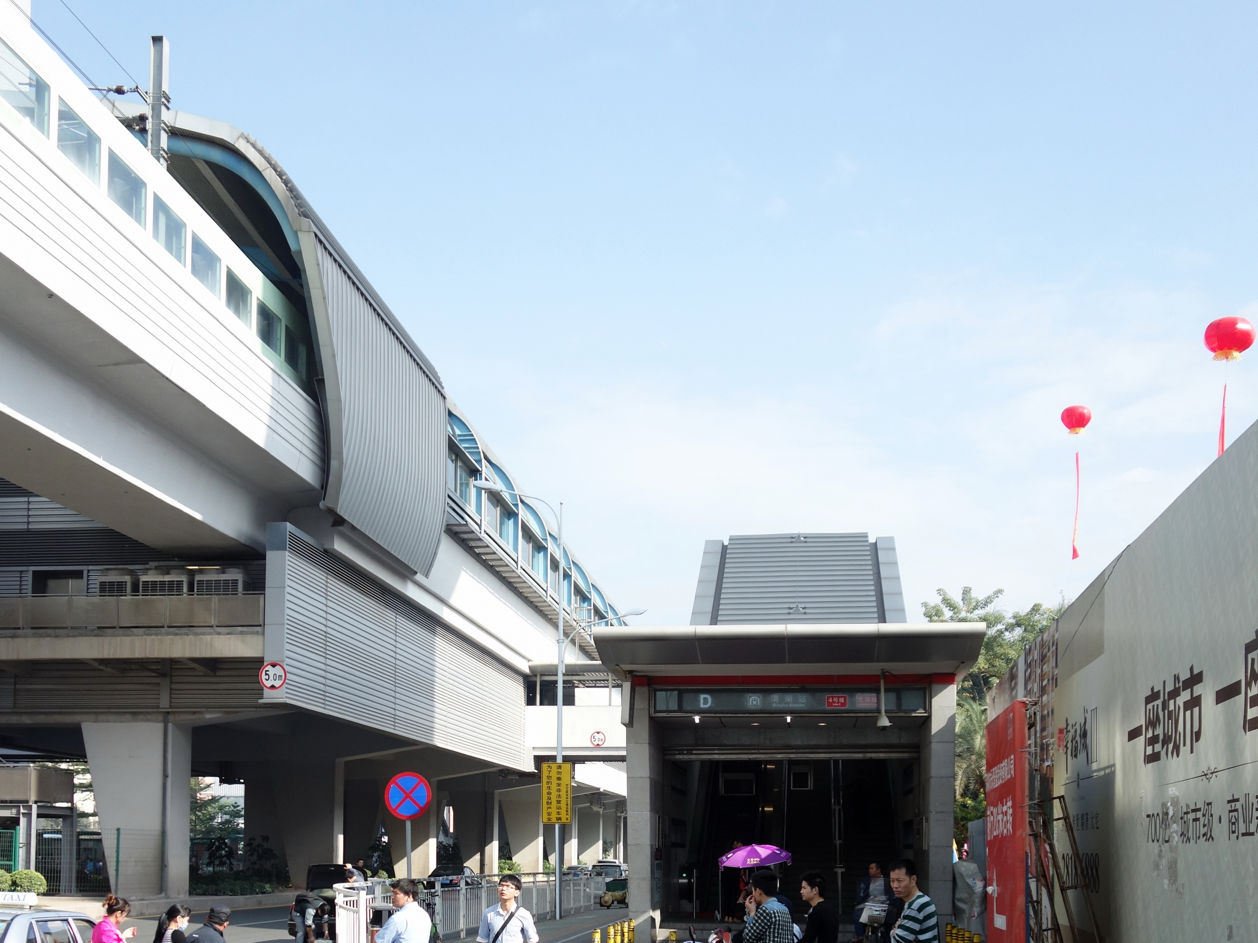 深圳地铁4号线(龙华线)清湖站D出入口